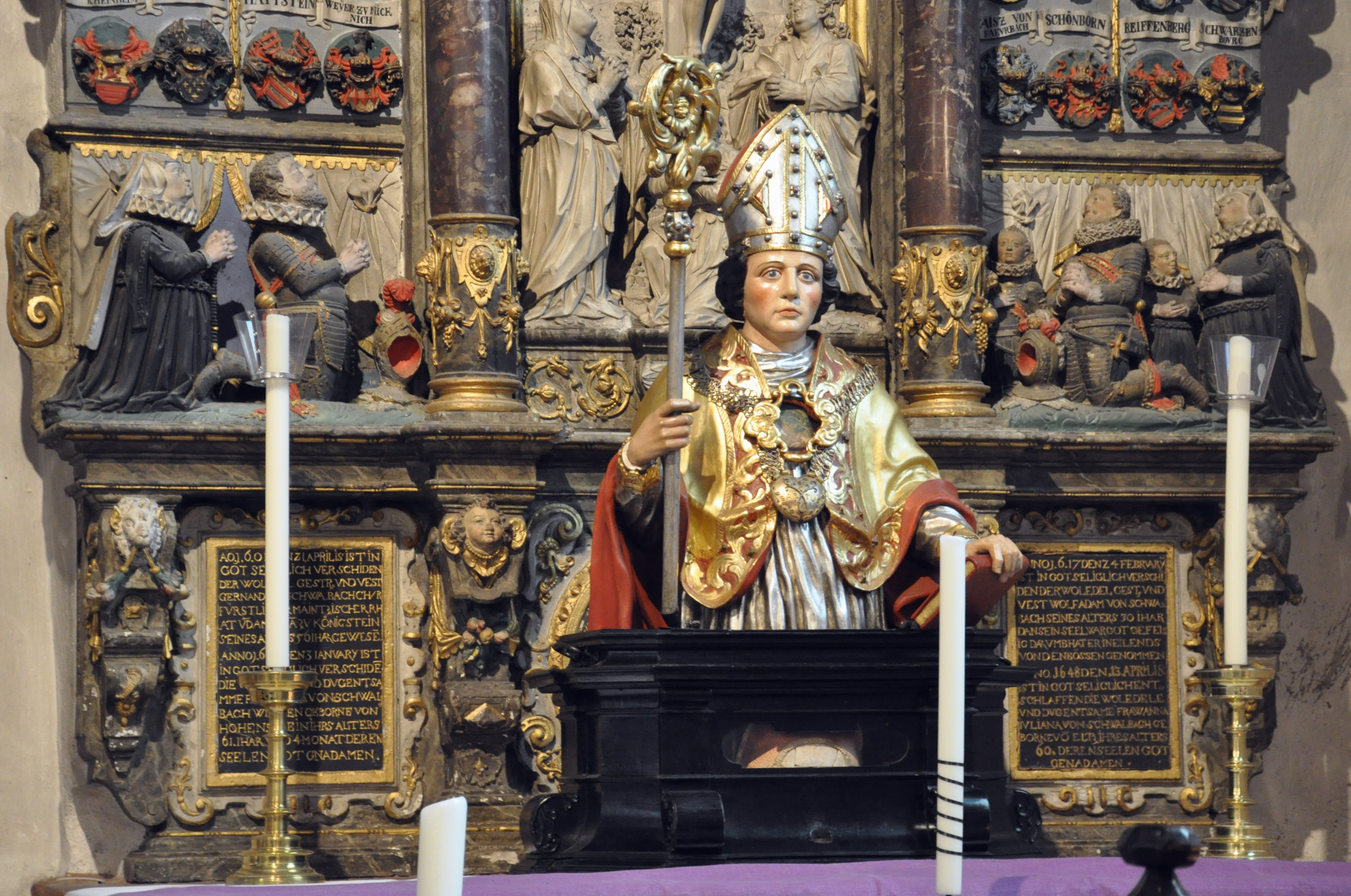 Kiedrich, Pfarrkirche St. Valentin, Katharinenaltar (Epitaphaltar für Juliane von Schwalbach, geb. von Eltz), 1620 Büstenreliquiar des hl. Valentin auf der Mensa